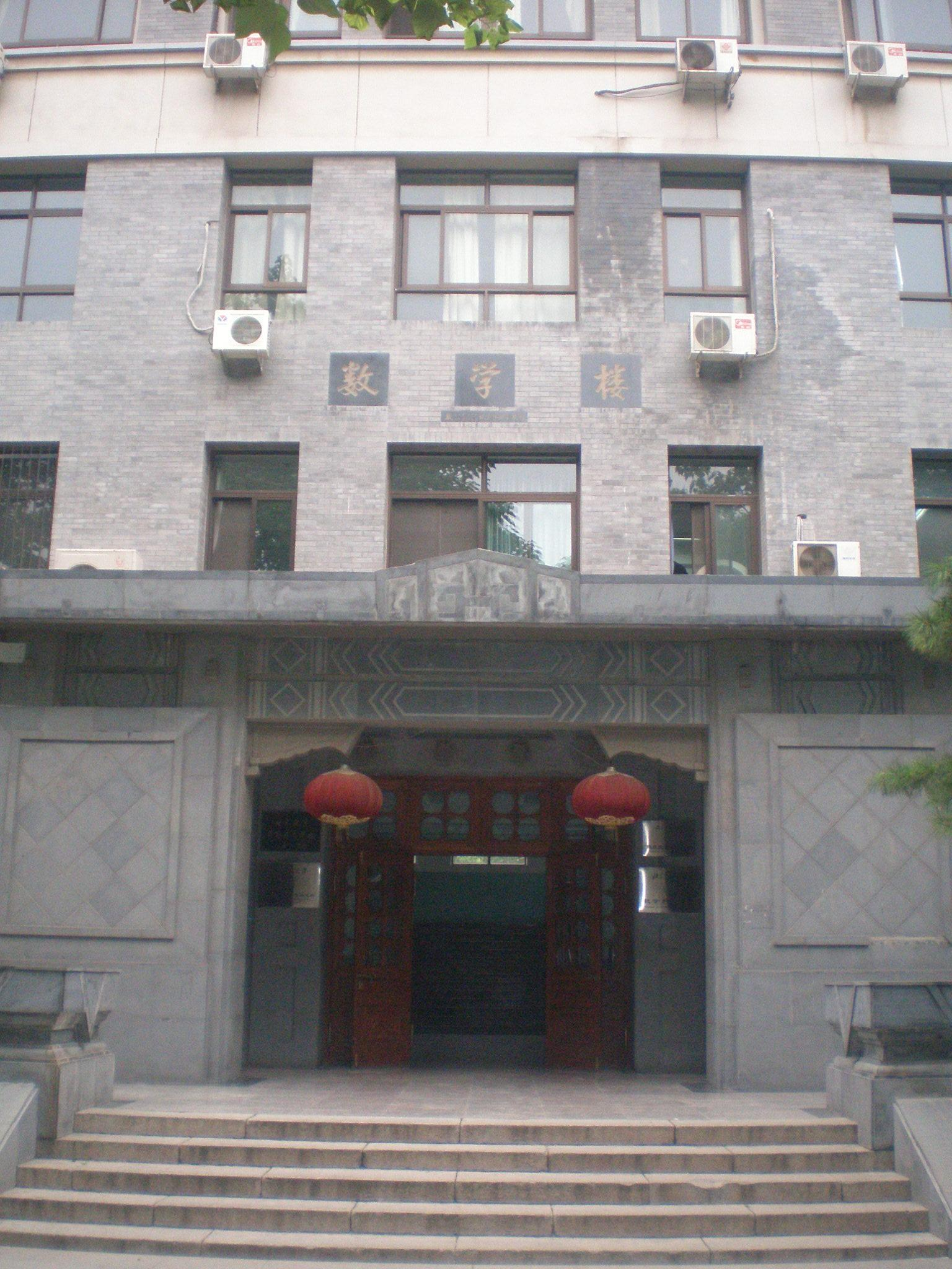 中文（中国大陆）: 北京师范大学